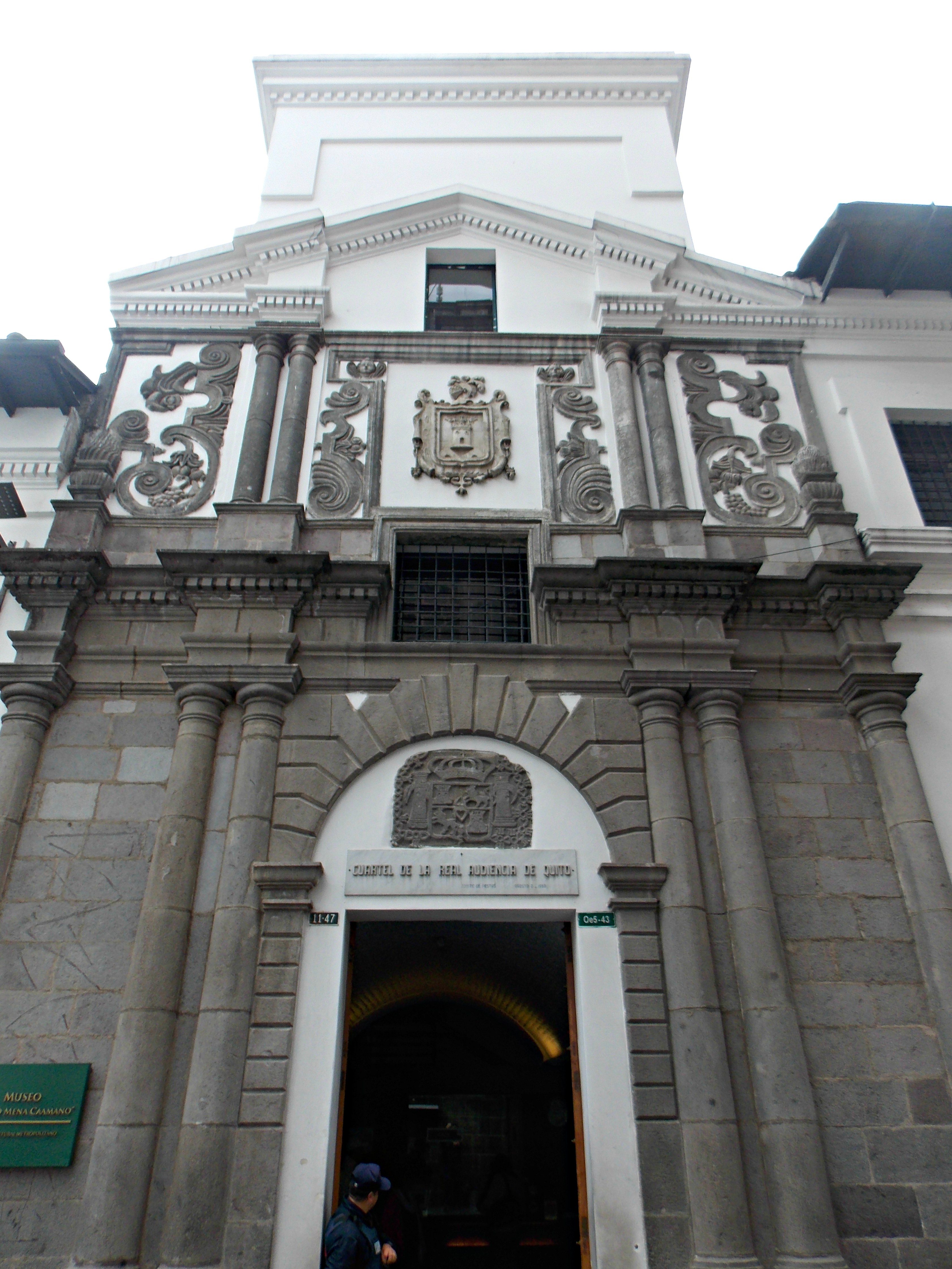 Ingreso al Museo Alberto Mena Caamaño, en el centro histórico de la ciudad de Quito (Ecuador).